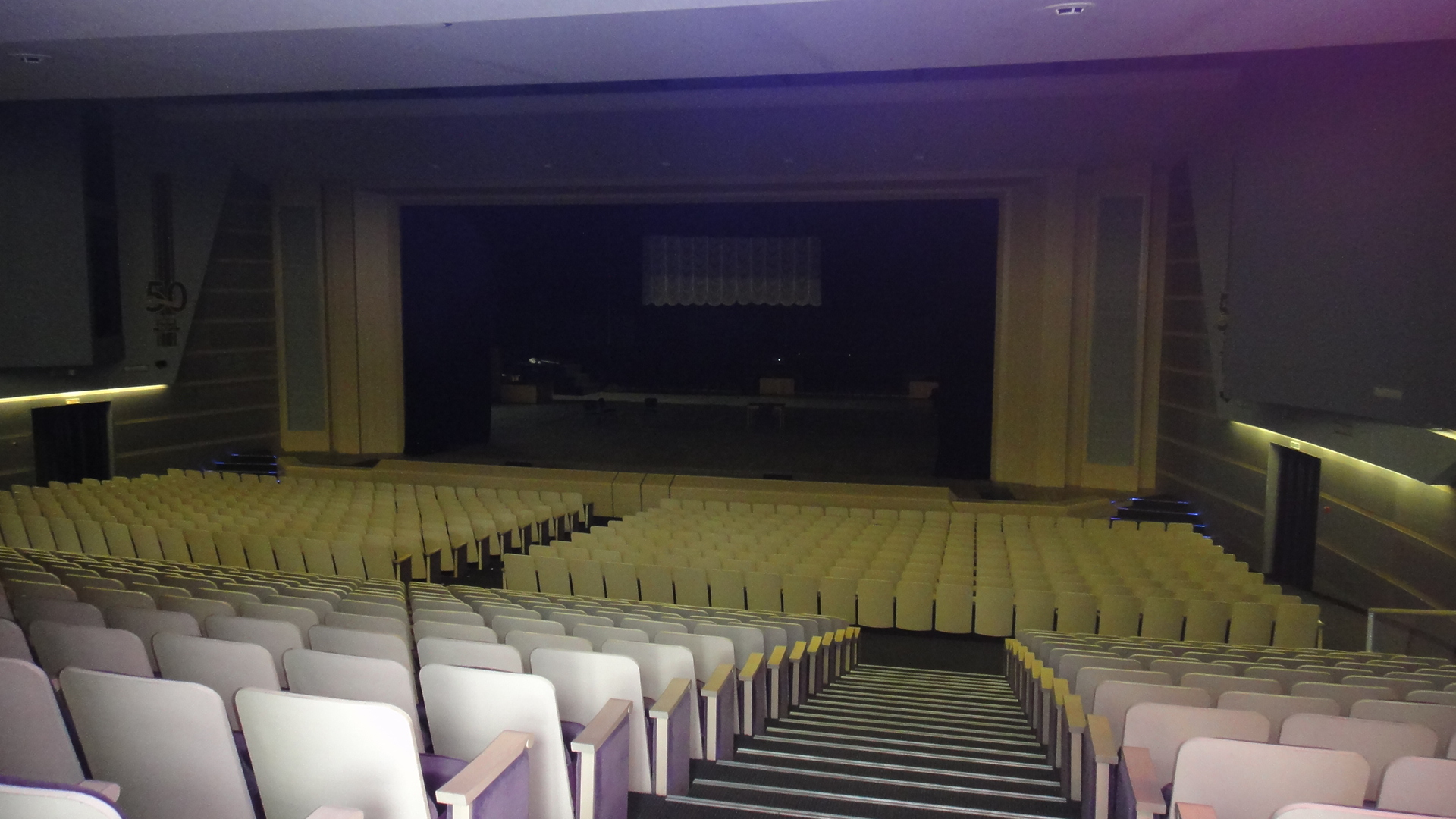 Большой зал Дома учёных (Новосибирский Академгородок)